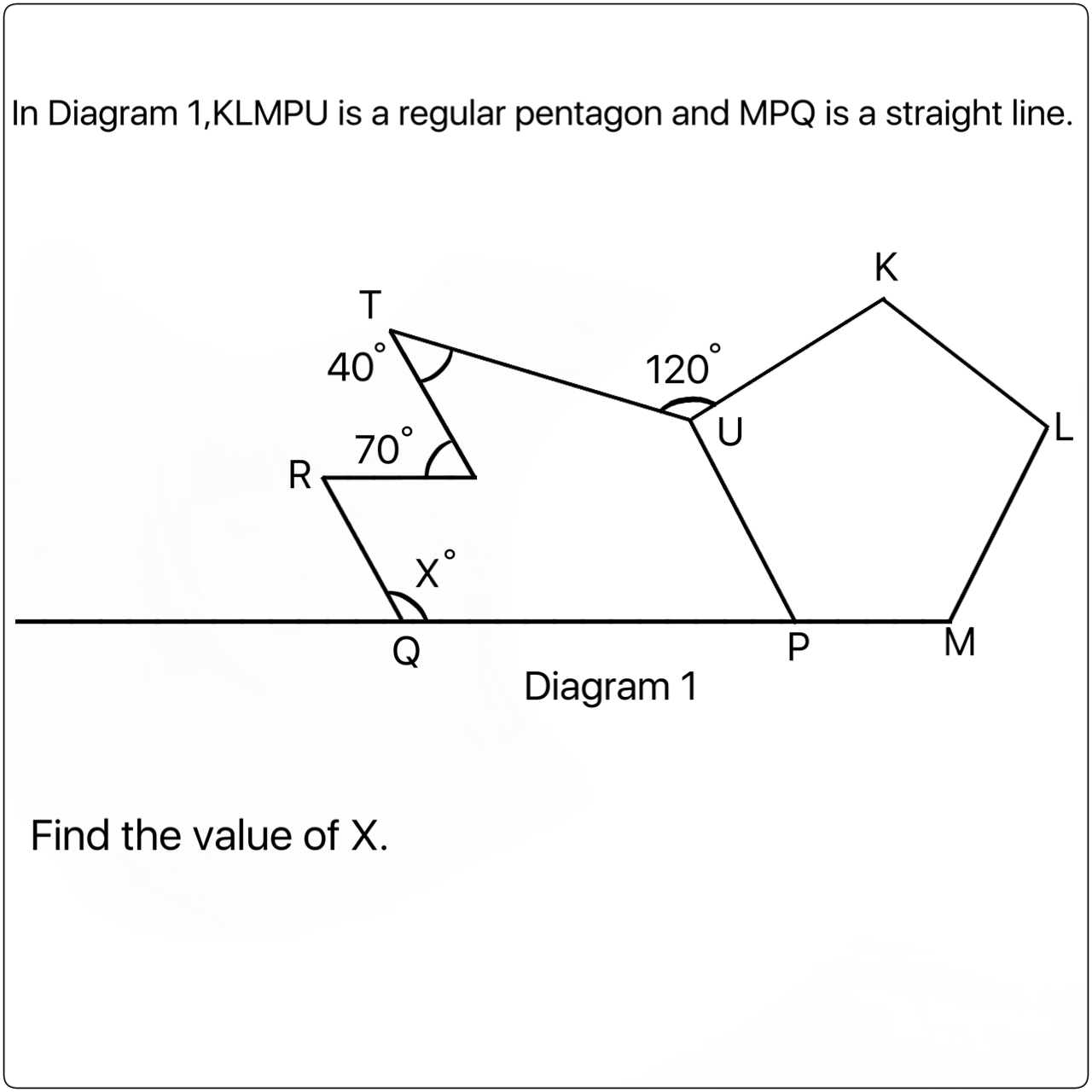 中文（中国大陆）: 一个标准的数学题